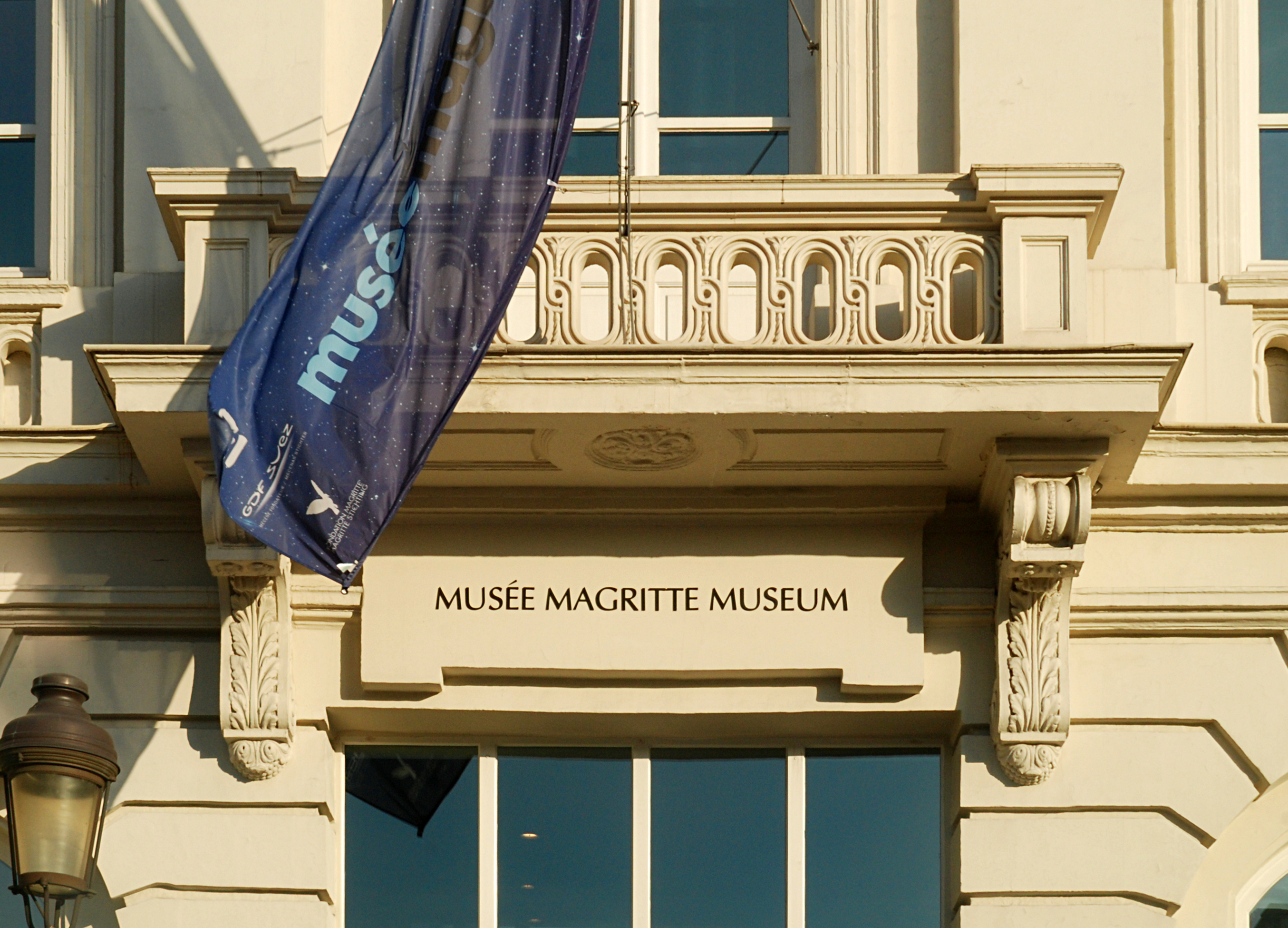 Belgique - Bruxelles - Place Royale - Hôtel du Lotto